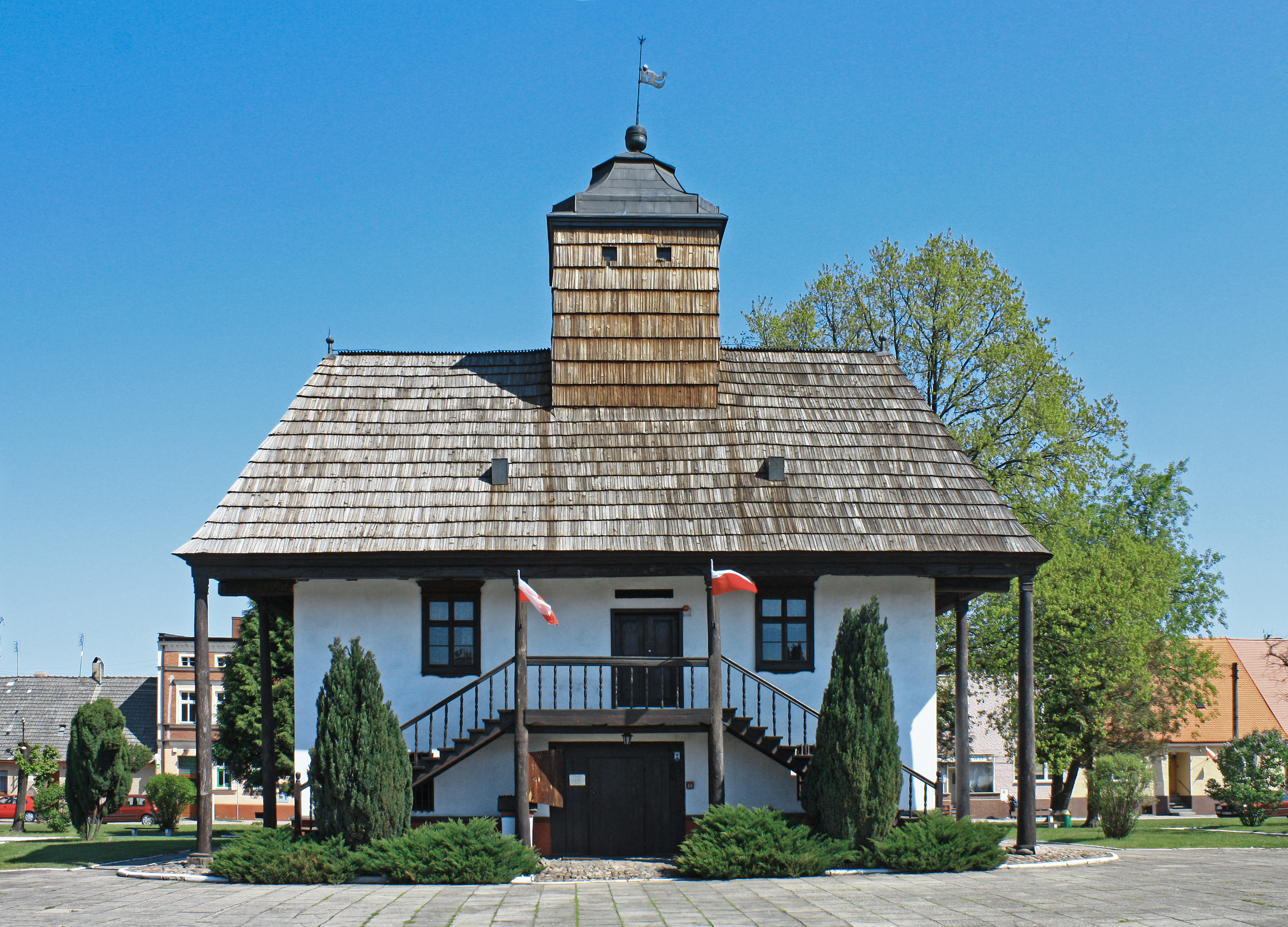 Sulmierzyce, ratusz, 1743